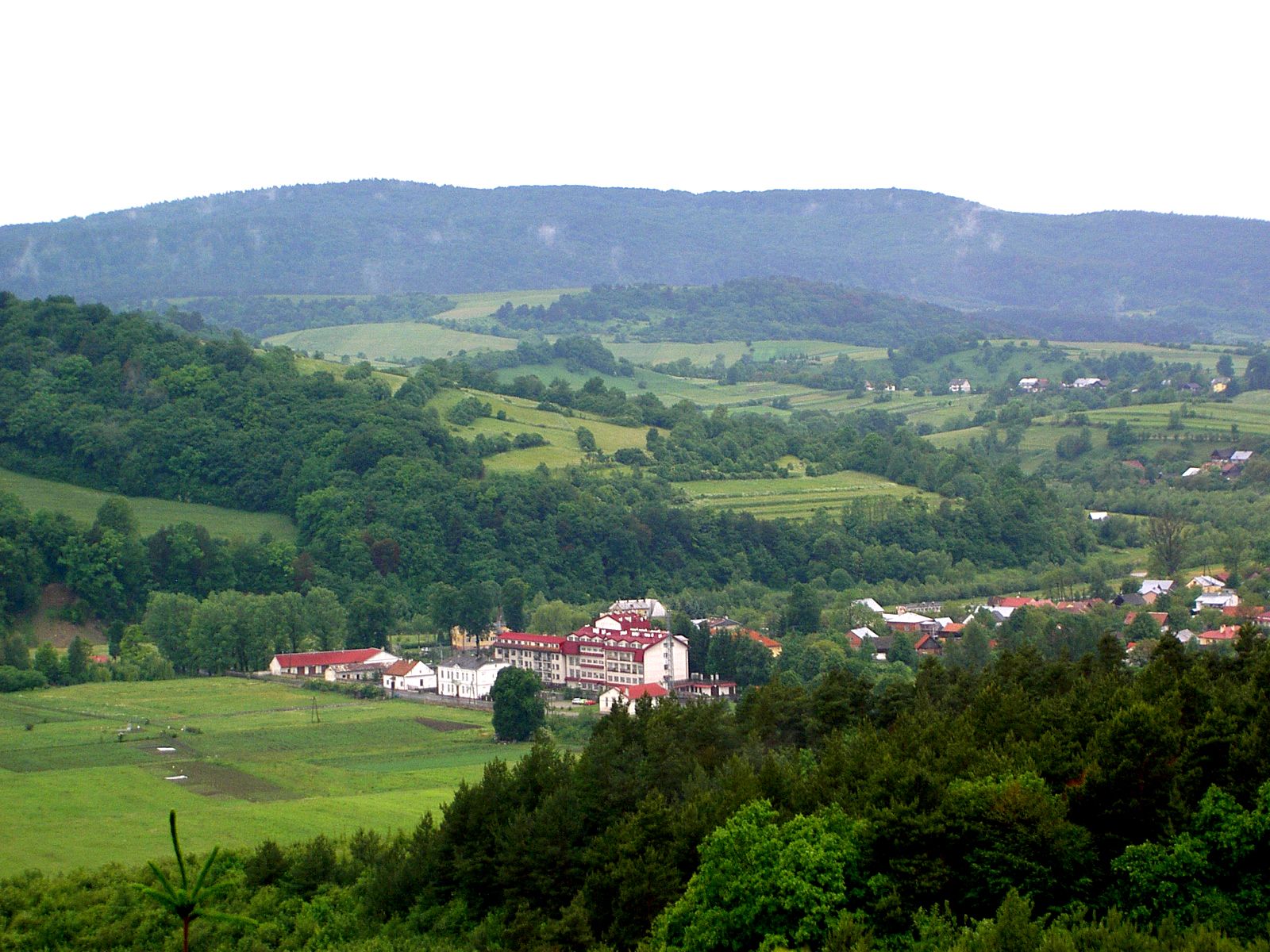 Huwniki, Poland